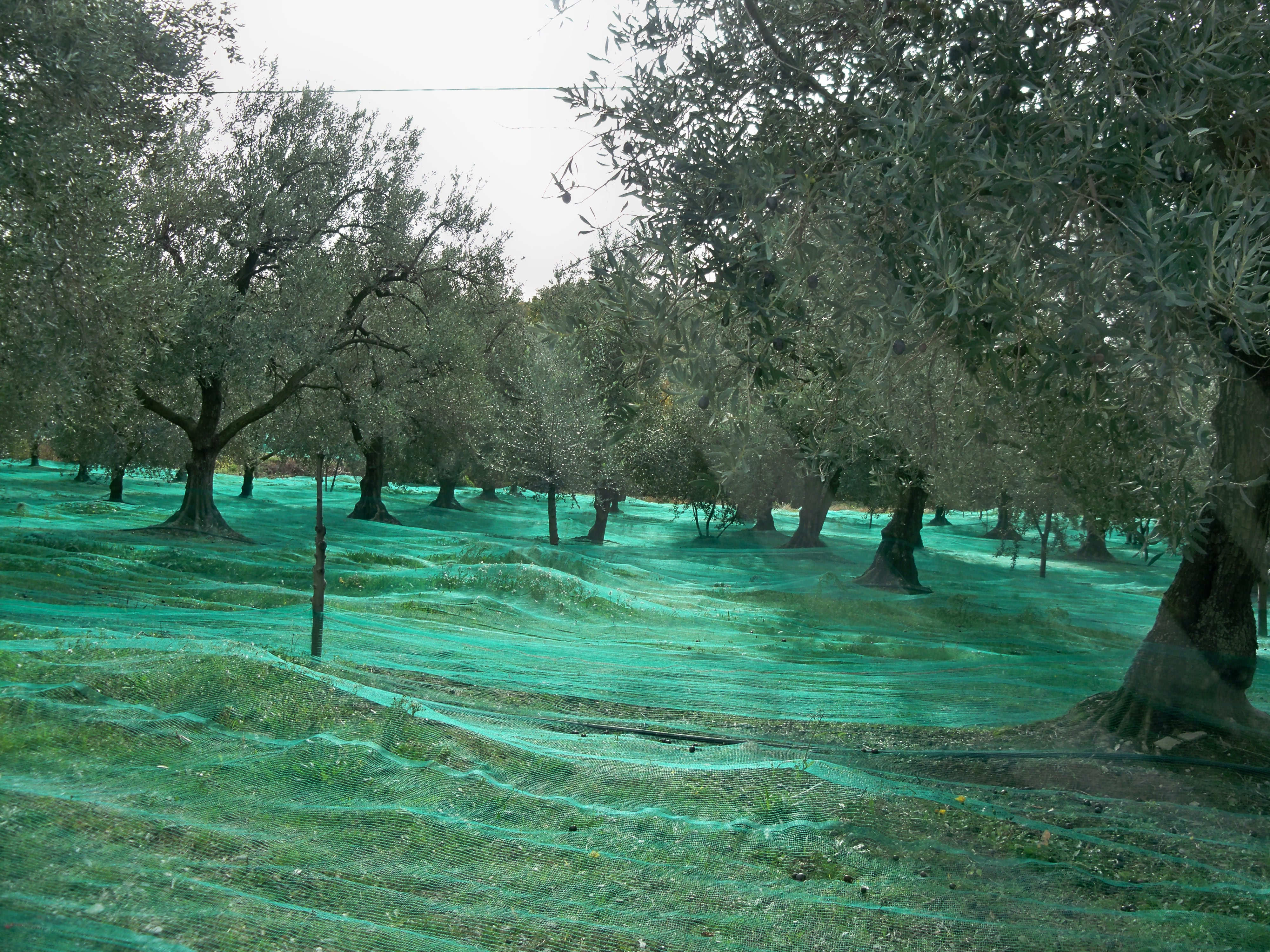 Oliviers sur la commune de Chateauneuf de Bordette